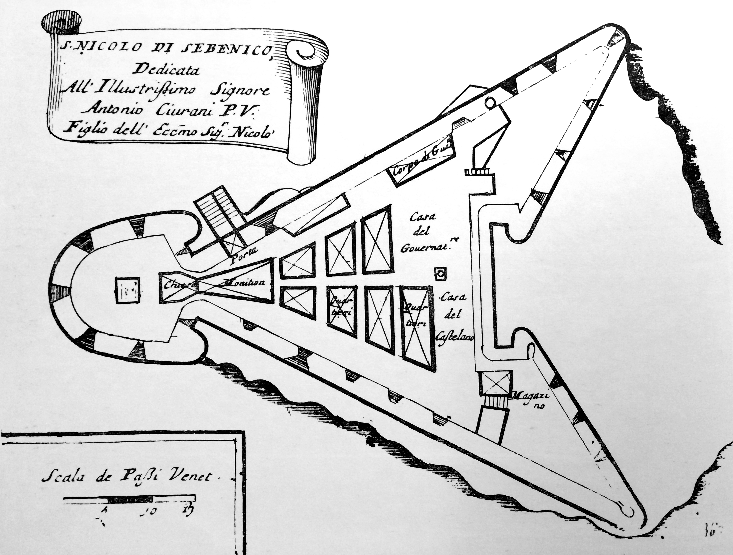 Mappa della fortezza di San Nicolò di Sebenico dedicata all'illustrissimo signore Antonio Ciurani P.V. figlio dell'eccellentissimo signor Nicolò